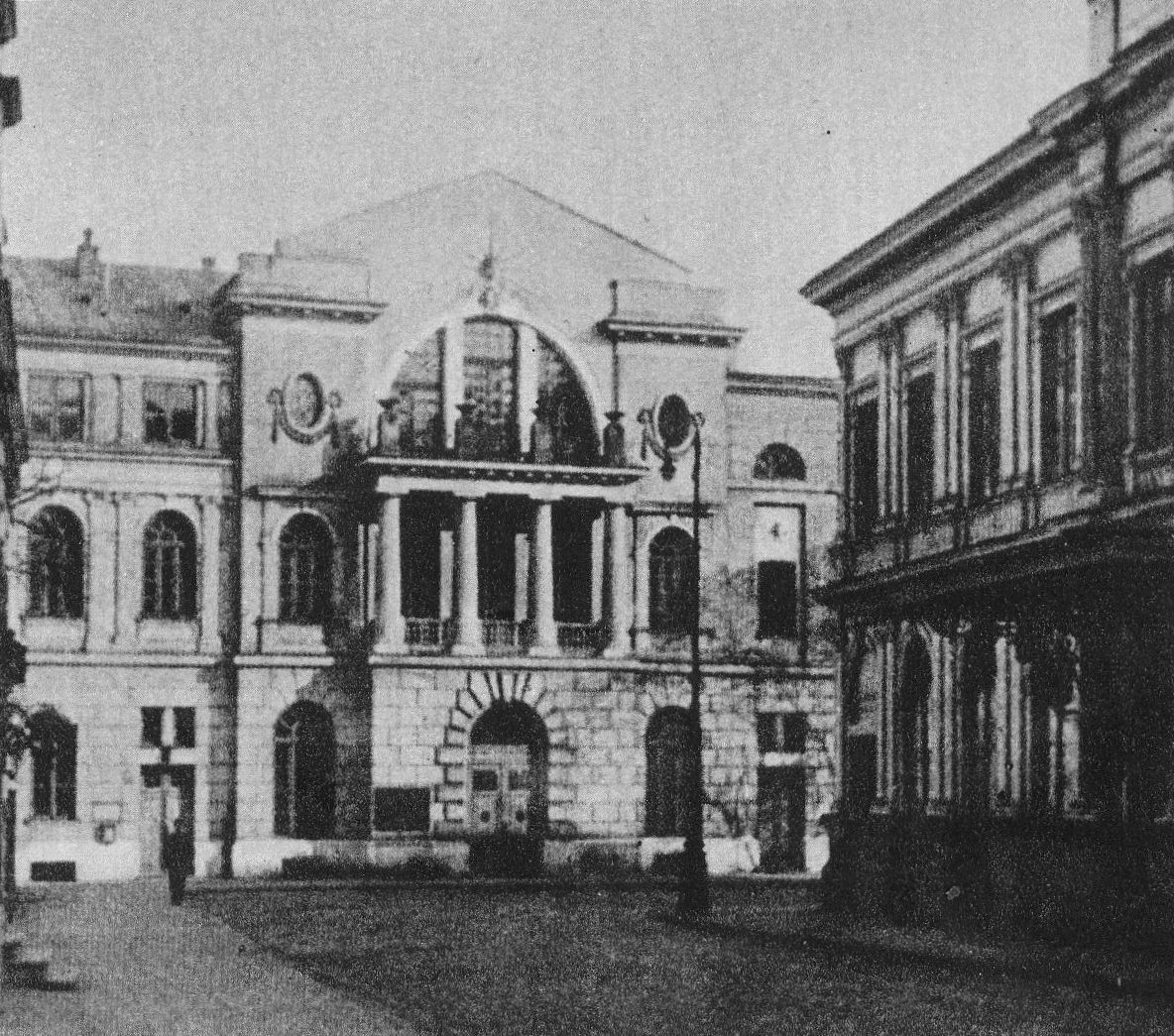 Ulica Ordynacka w Warszawie. Konserwatorium Muzyczne pod adresem ul. Okólnik 1